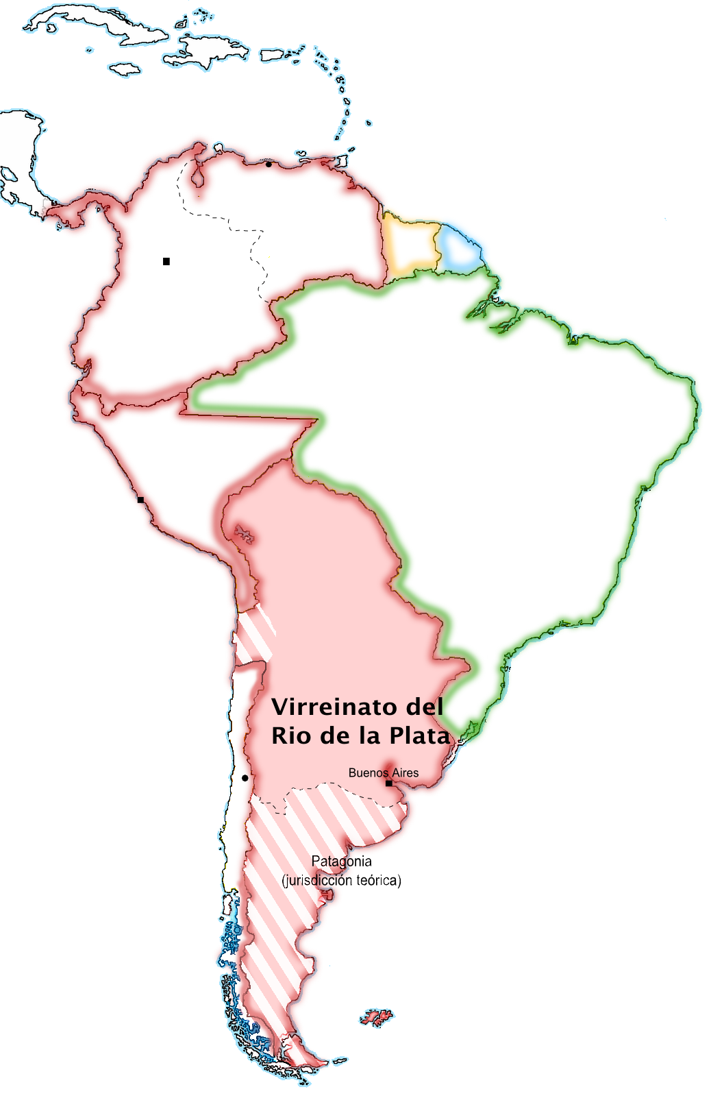 Map of Viceroyalty of the Río de la Plata / Mapa del Virreinato del Río de la Plata